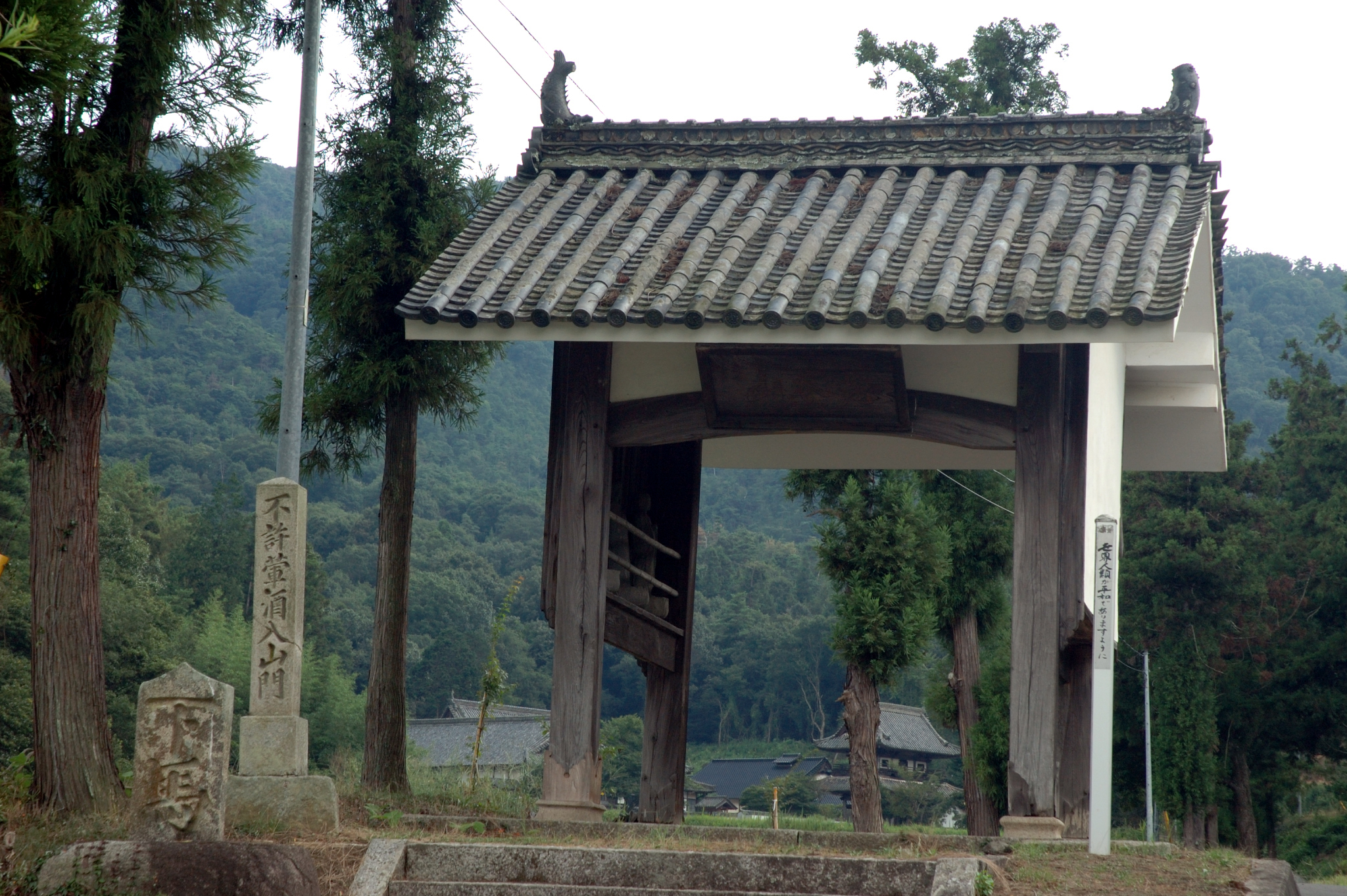 Ni-no-mon gate